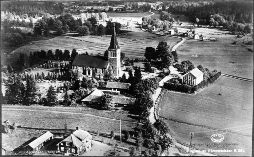 Kyrkan och dess omgivning, flygfoto mot norra sidan. Vykort. Nyckelord: Flygbilder Kategori: (01) ExteriörerKyrkan och dess omgivning, flygfoto mot norra sidan. Vykort.